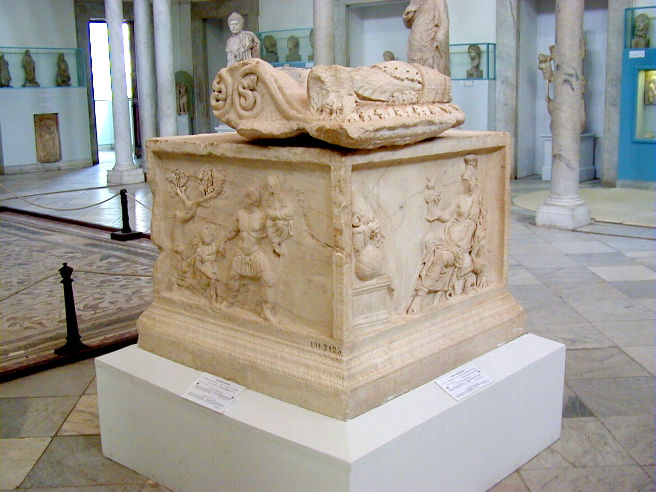 Autel de la gens Augusta, provenant de Carthage (Musée du Bardo)